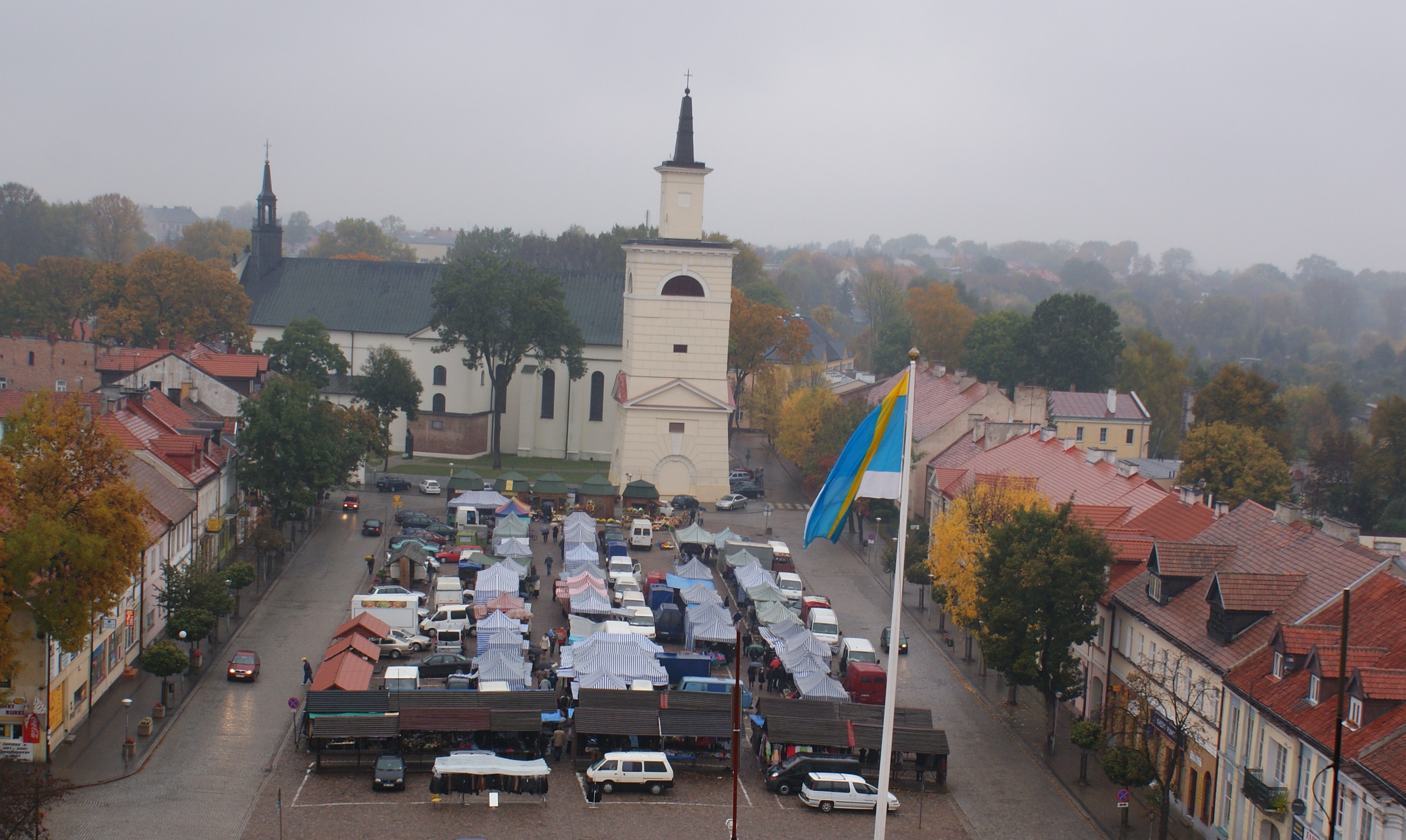 Widok na Rynek z wieży.